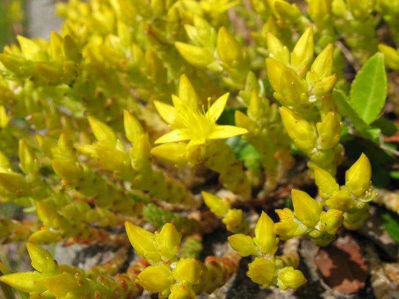 Sedum acre